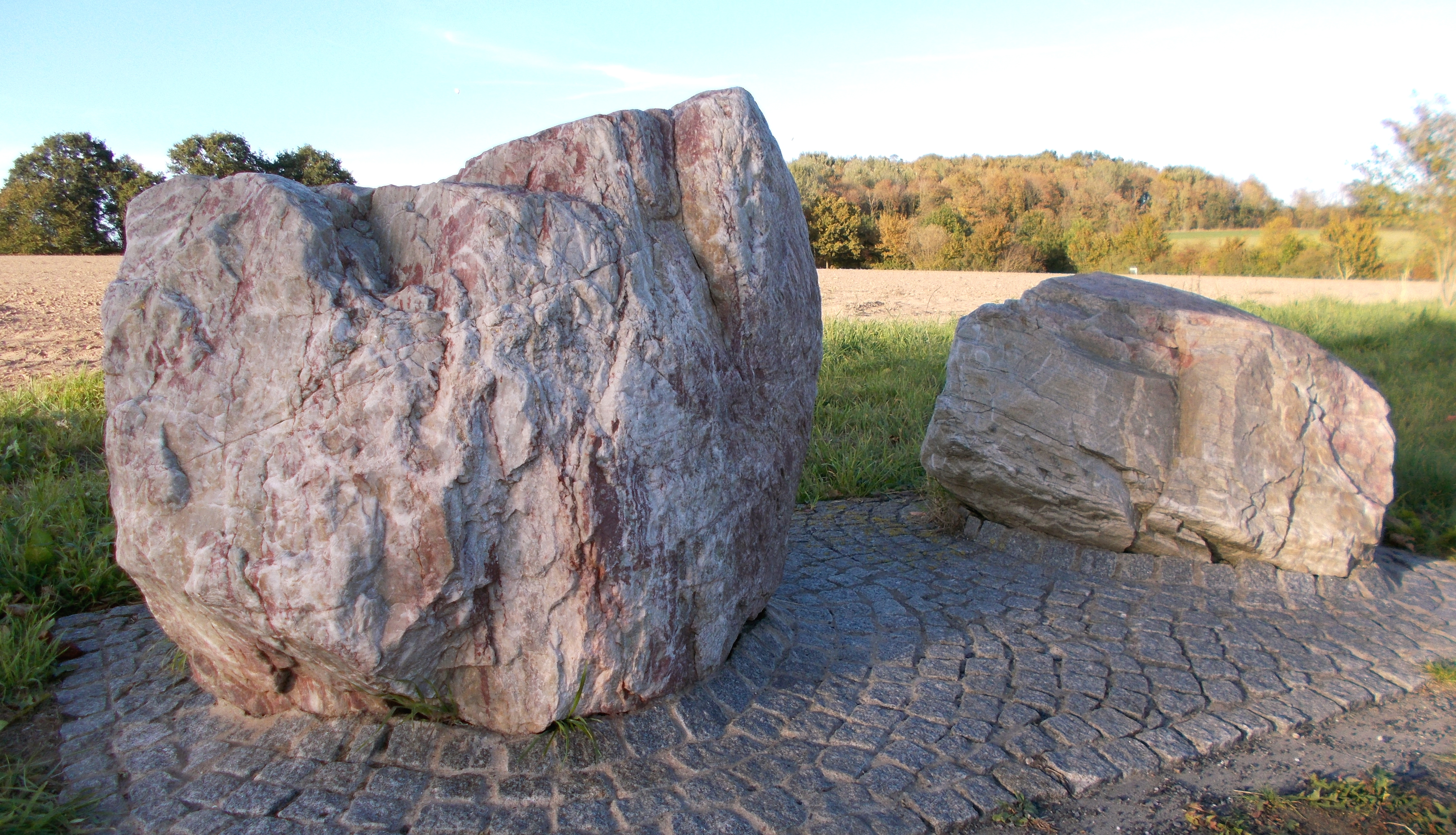 Findlingsweg Sonsbeck Station 7: Devon Quarzit (rötlich)